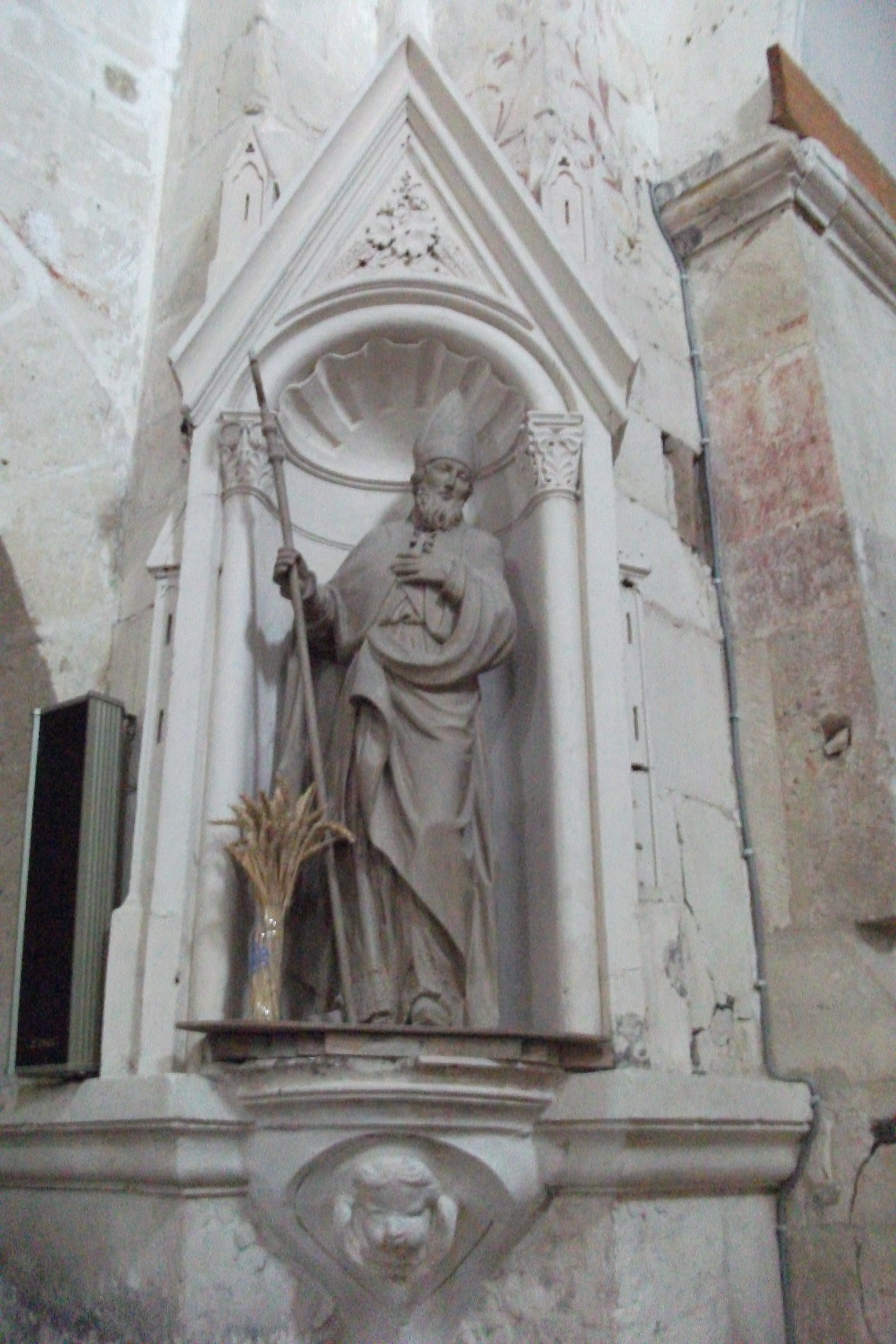 En l'Église de Bezannes .